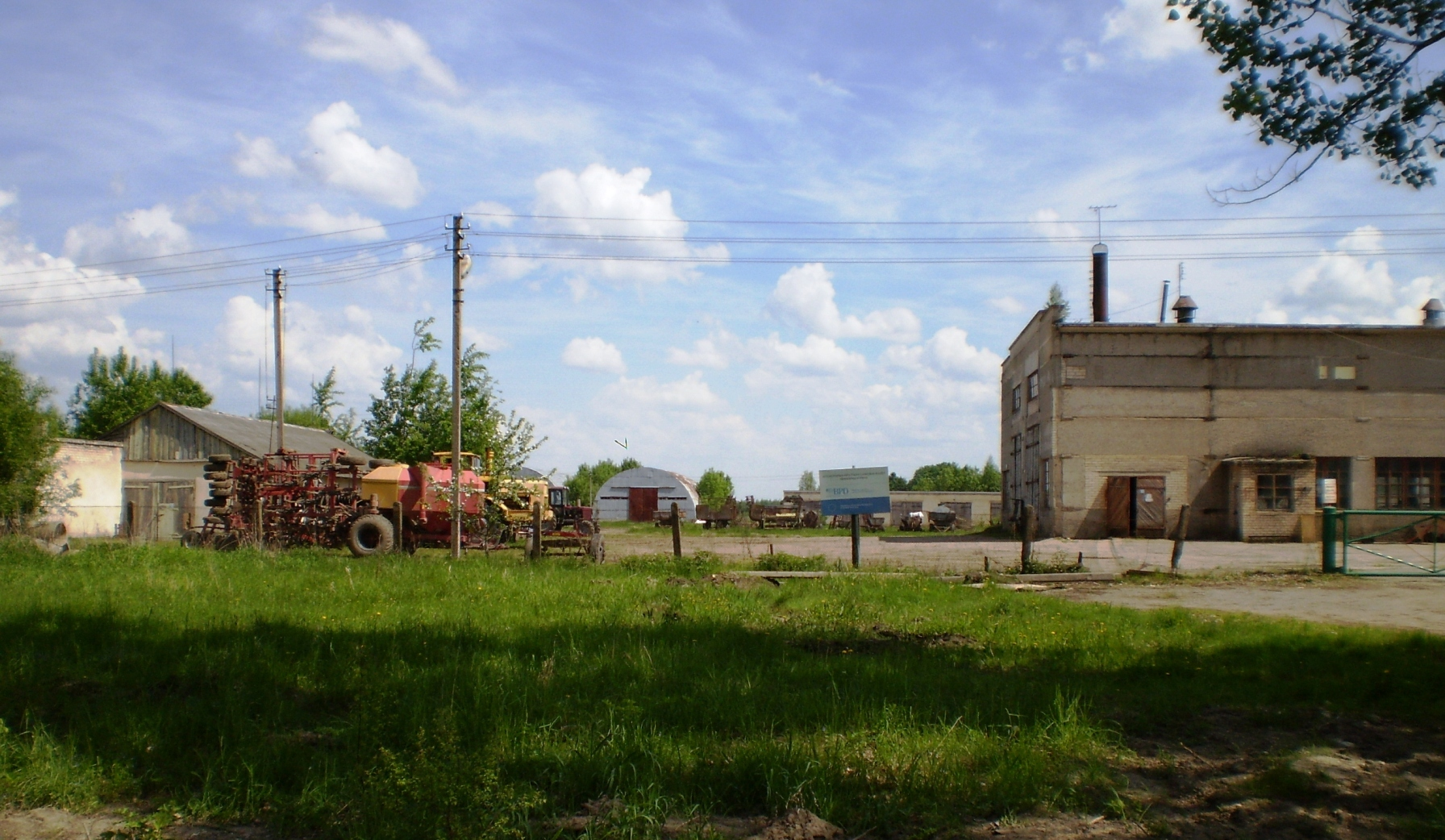 Mantviliškis, Traktorių stotis, Kėdainių raj.